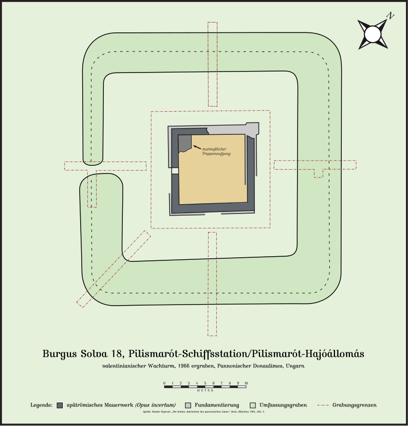 Burgus Solva 18, Pilismarót-Schiffsstation (Pilismarót-Hajóállomás), Ungarn. Valentinianischer Burgus, ergraben 1966 durch Sándor Soproni. Quelle: Sándor Soproni: „Die letzten Jahrzehnte des Pannonischen Limes“, Beck, München 1985, Abb. 5.